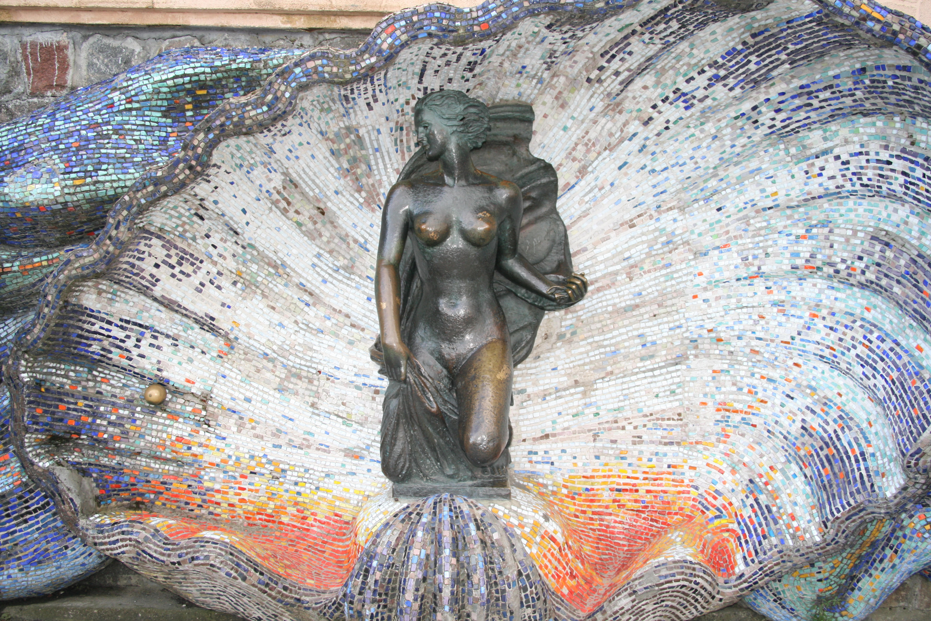 Skulptur 'Nymphe' aus dem Jahr 1938 von Hermann Brachert an der Strandpromenade von Swetlogorsk (Rauschen/Ostpreußen, Samland)